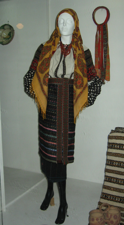 Женский праздничный наряд, ПодольеЖенский праздничный наряд, Подолье, собрание музея этнографии во Львове